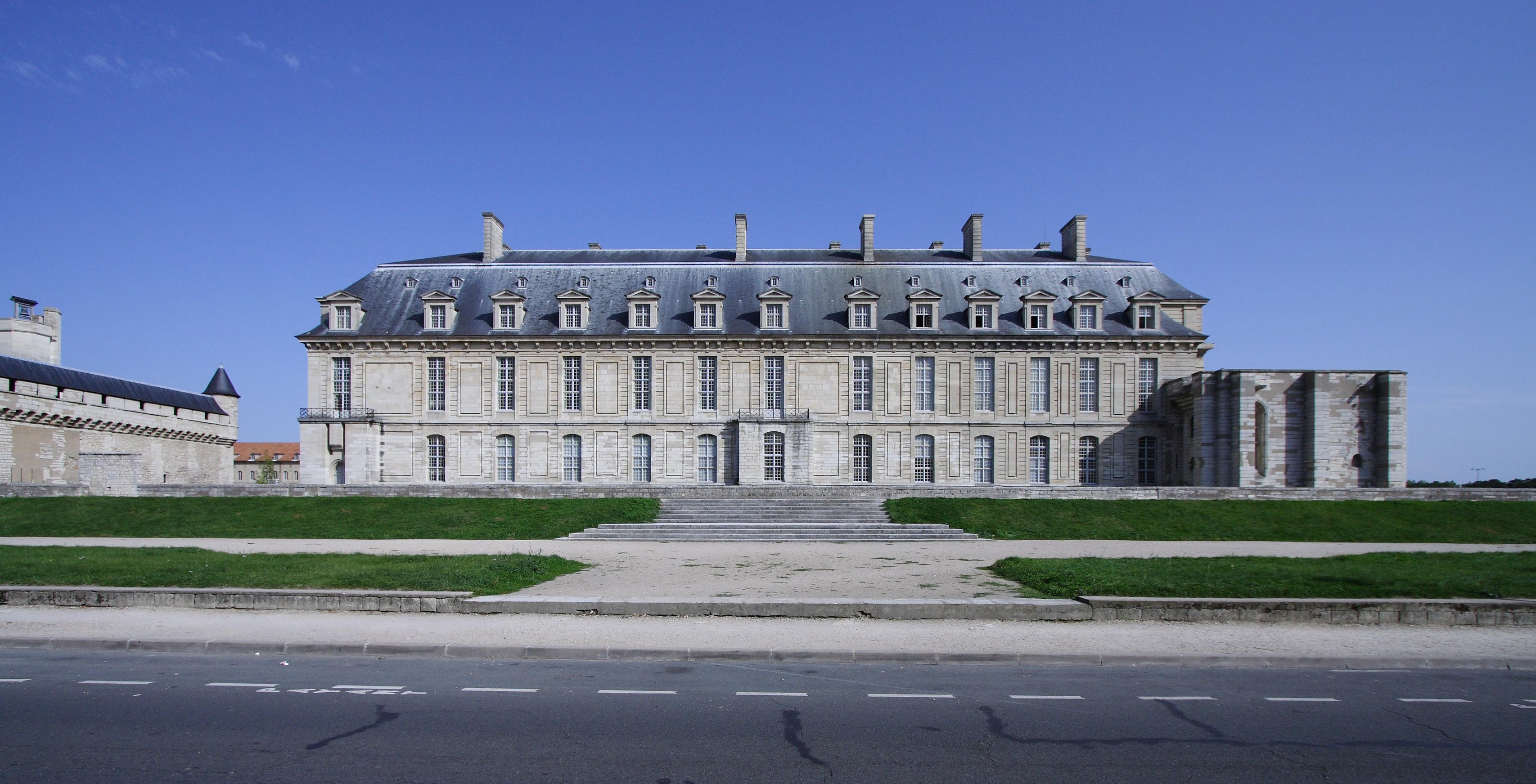 Château de Vincennes (Paris, France)